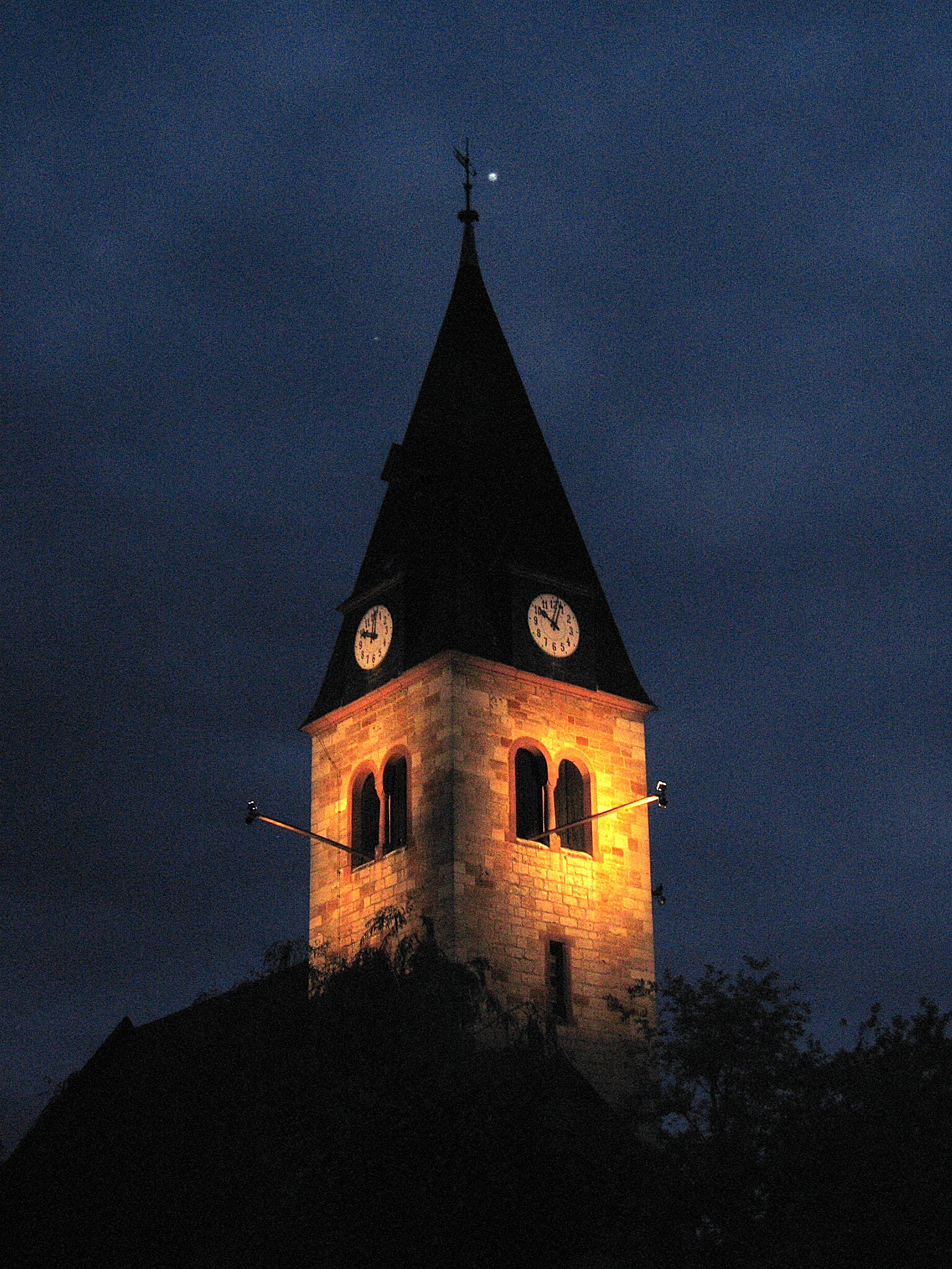 Kirche St. Cruscis bei Nacht in Thalebra